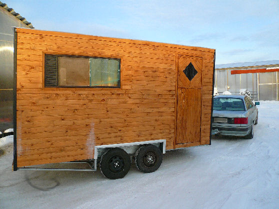 Kärrysauna